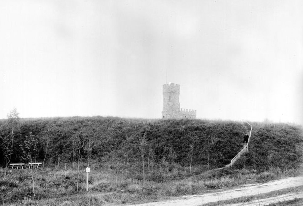 Srokowo, Wieży Bismarcka